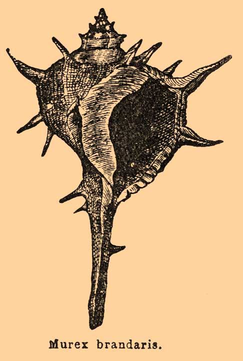 Иллюстрация к статье Murex из энциклопедии Брокгауза и Ефрона